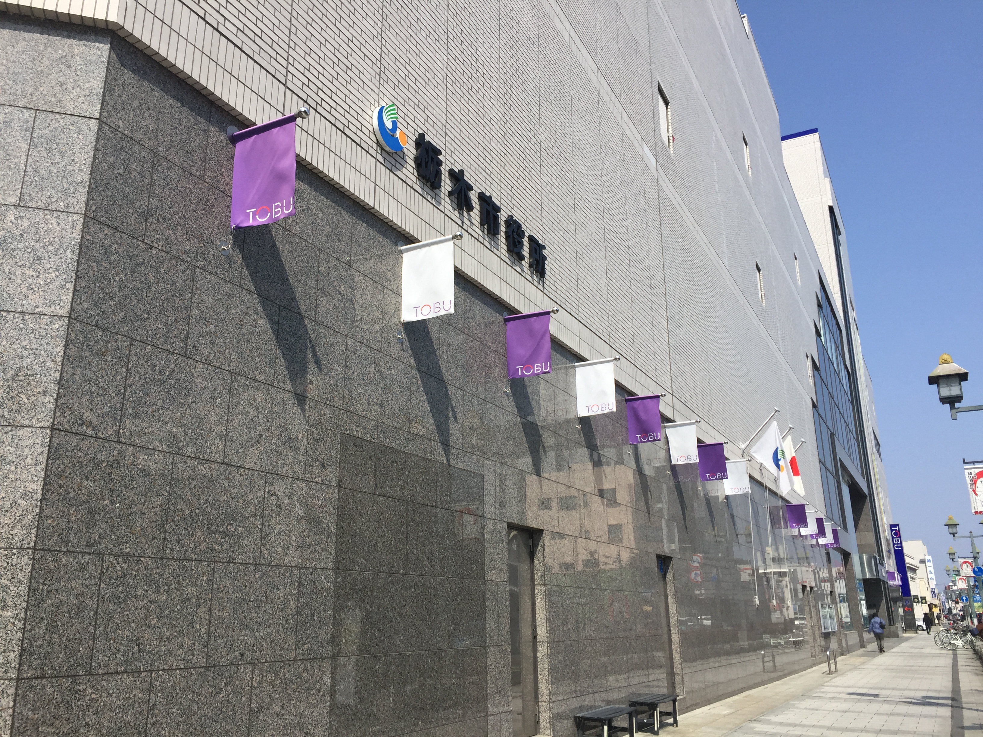 2014年から使用されている栃木市役所の庁舎。東武百貨店との複合施設